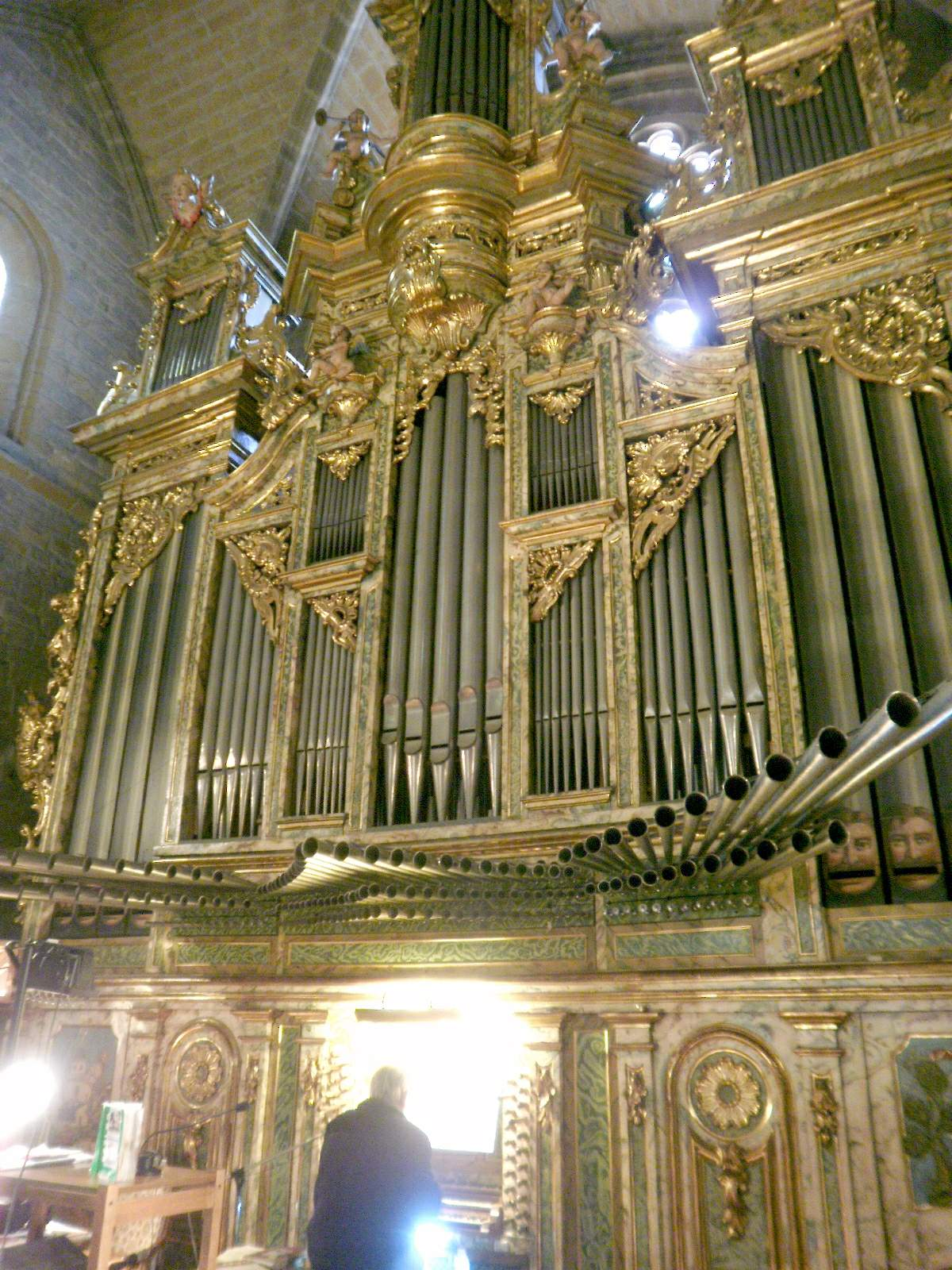 Iglesia de San Nicolás (Pamplona)